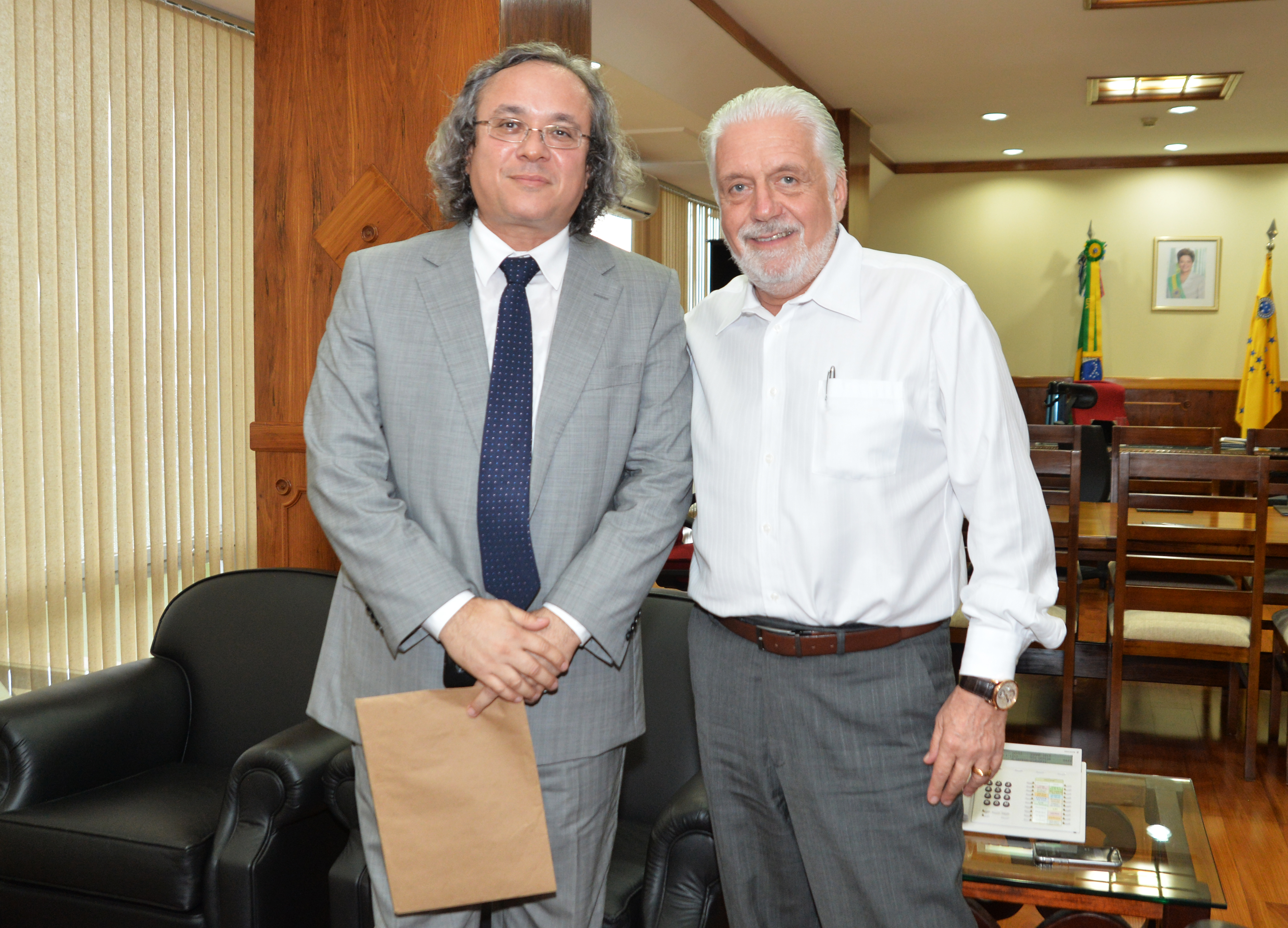 25/03/2015, Brasília - DF Foto: Jorge Cardoso